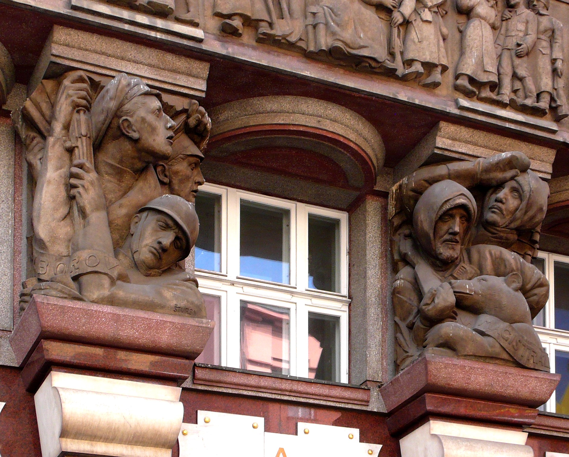 Banco de la Legión de Checoslovaquia (1921-1923). Josef Gočár. Calle Na Poříčí 24. Nové Město